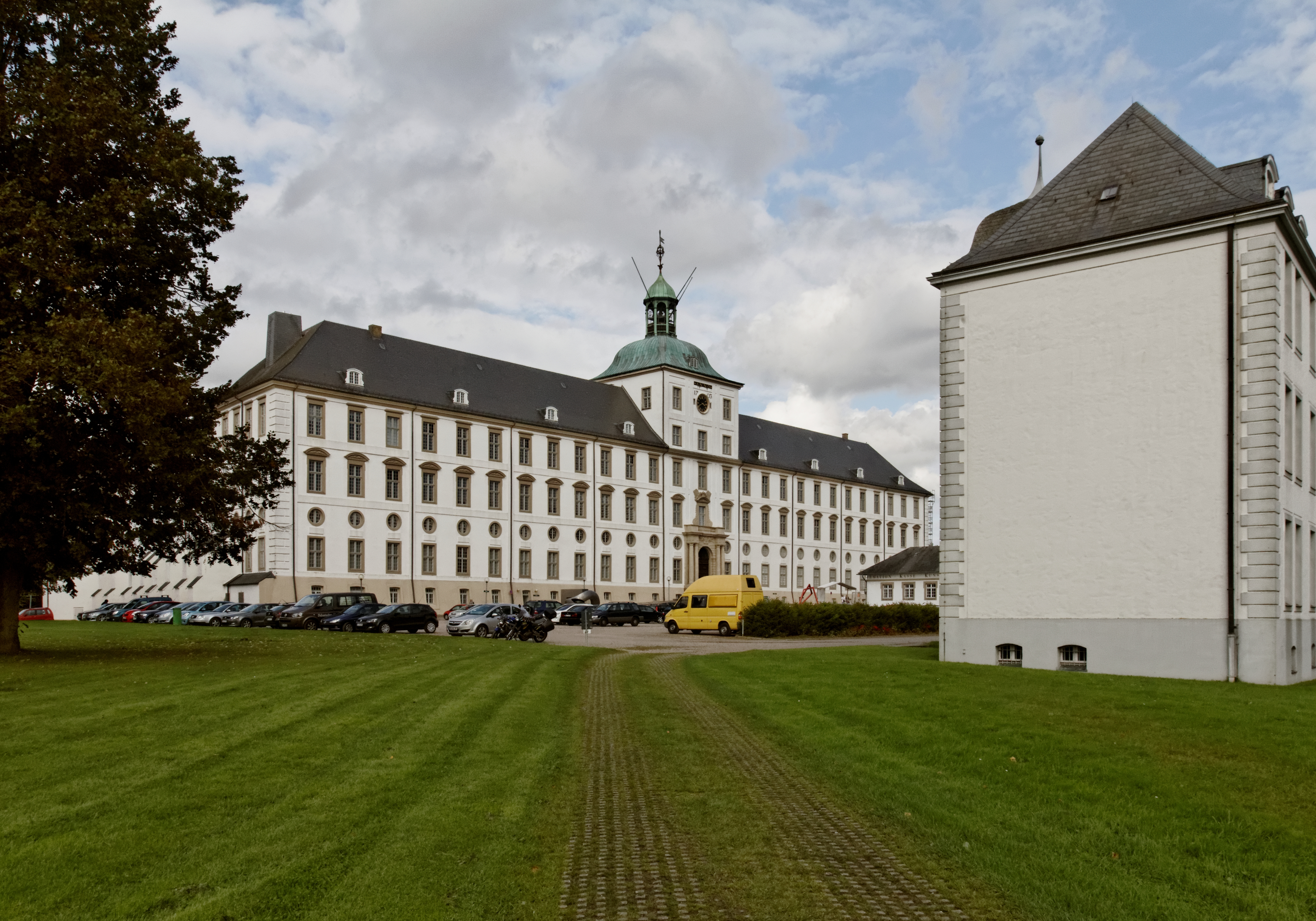 Schleswig Schloss Gottorf